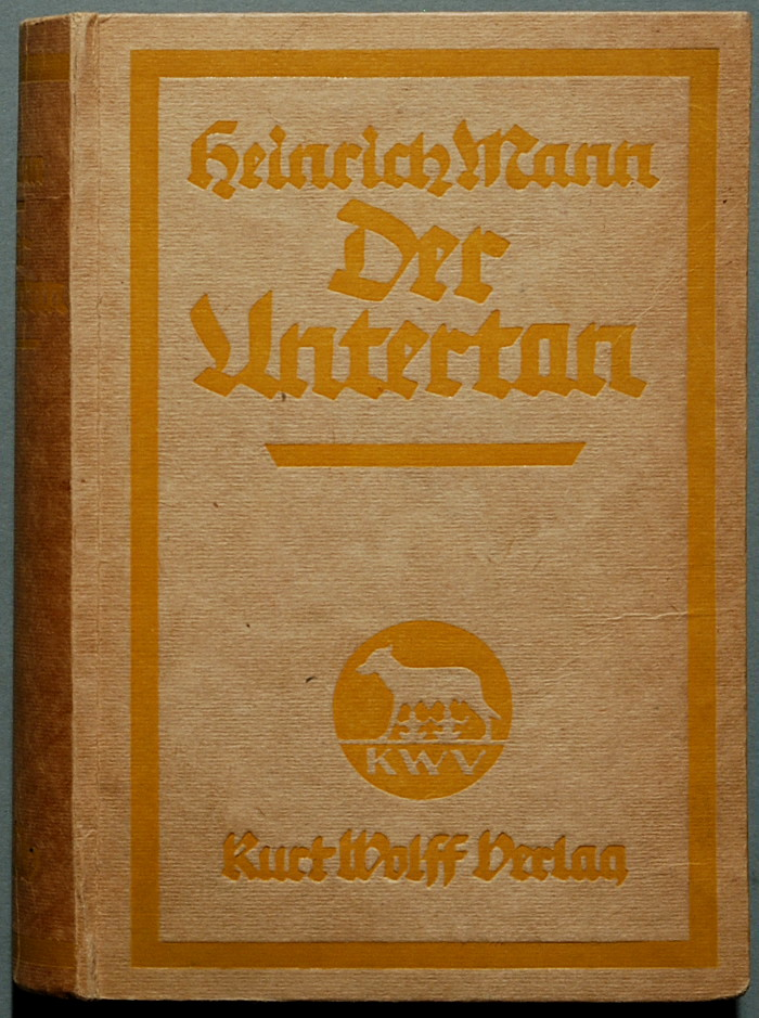 Mann, Heinrich: Der Untertan. Roman. Leipzig: K. Wolff 1918, 529 paginierte Seiten; Erstausgabe (Wilpert/Gühring² 36) Original-Pappband 19 x 12,5 cm.